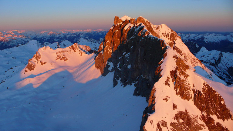 Die Rote Wand (Vorarlberg) im morgendlichen Licht in Richtung Westen fotographiert.